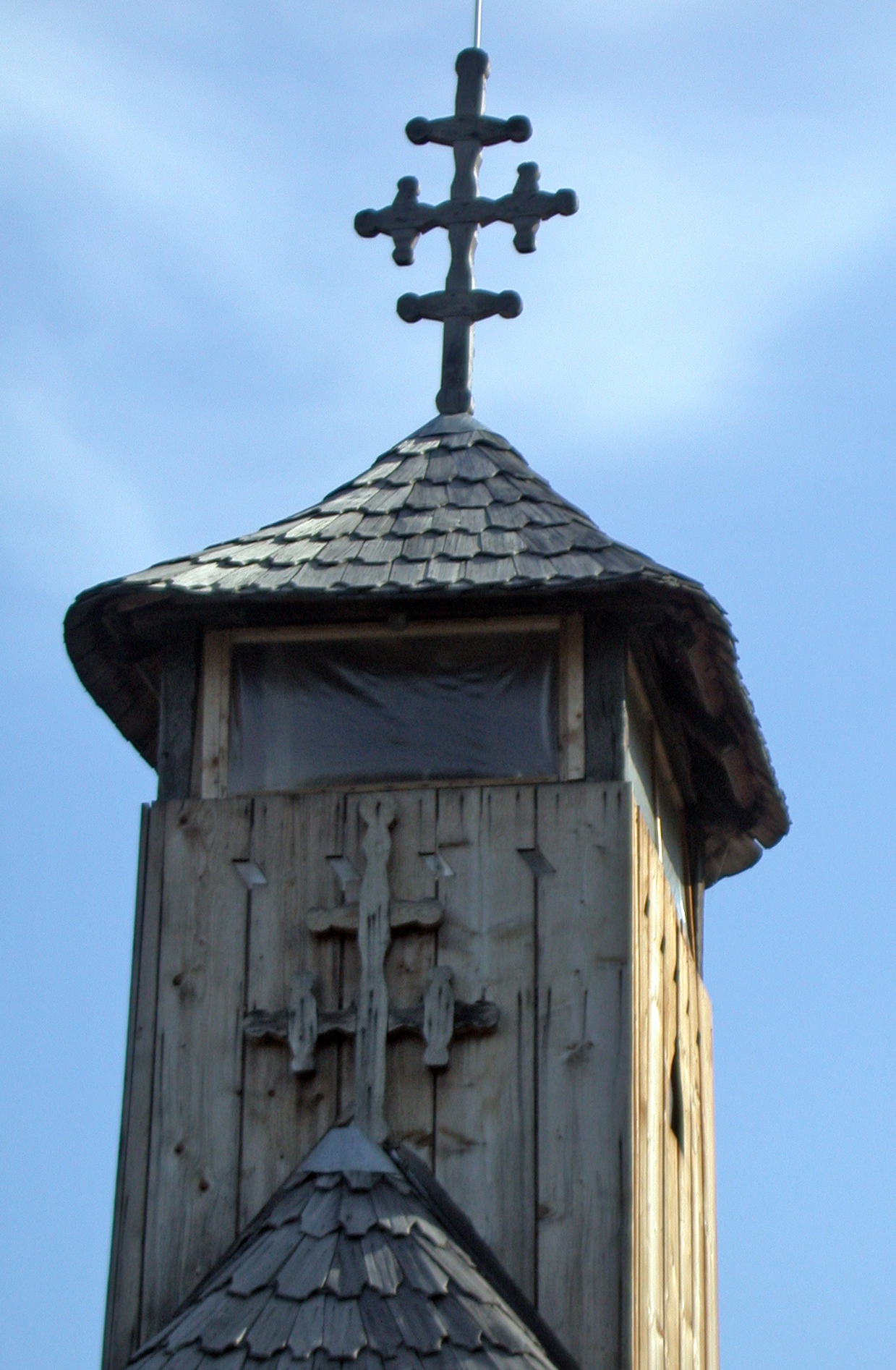 Romania, Bucarest, chiesa in legno nel "Village Museum", particolare della torre campanaria